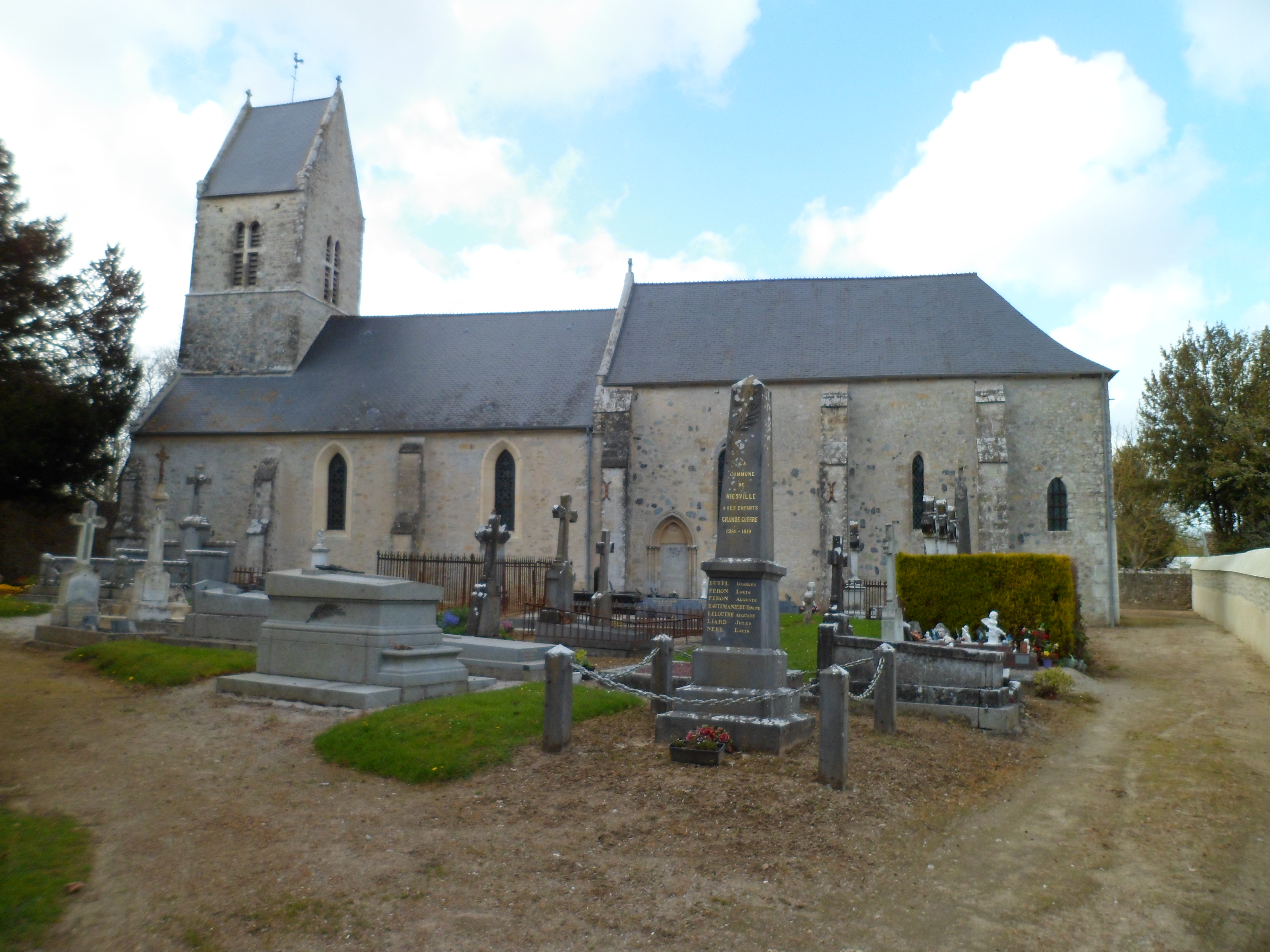 Église Saint-Côme Saint-Damien d'Hiesville